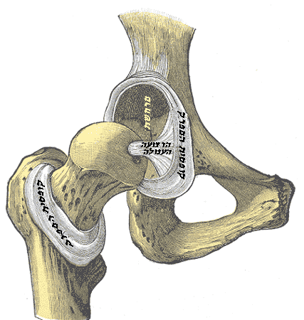 מפרק הירך במבט קדמי, מרבית הקופסית הוסרה